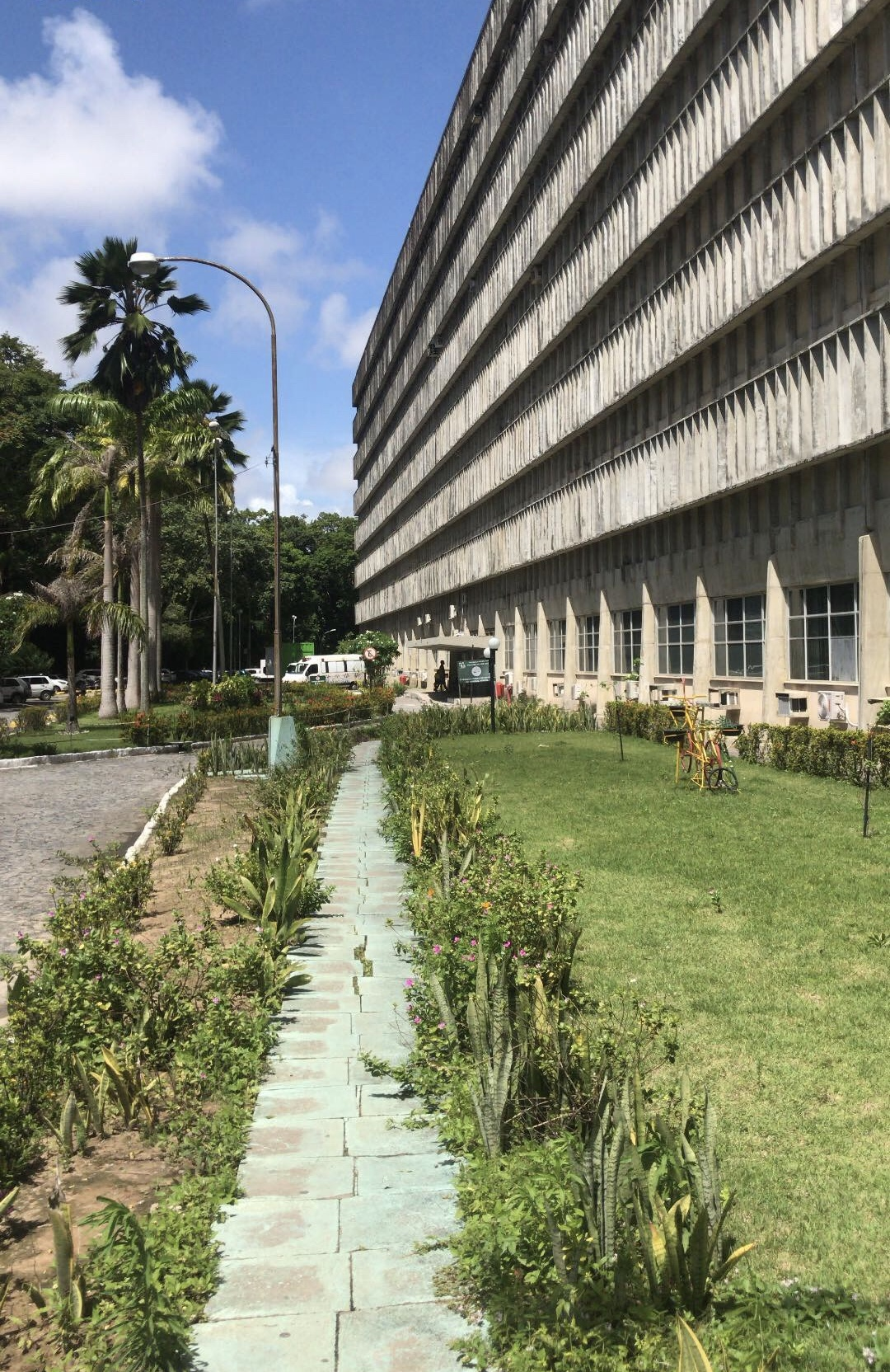 Foto retirada do Hospital Universitário Lauro Wanderley da Universidade Federal da Paraíba, localizado no município de João Pessoa, Paraíba, Brasil.